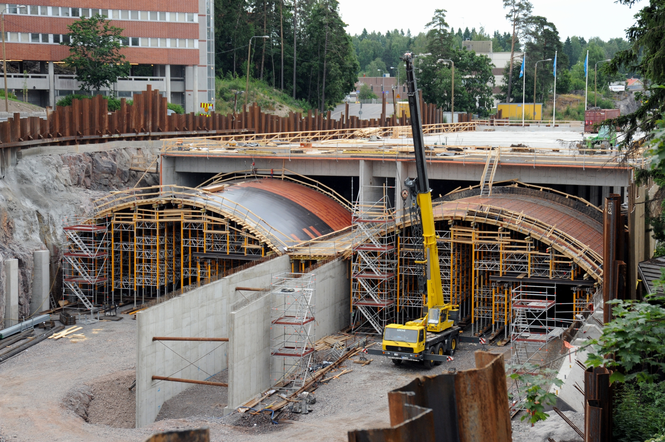 Kehä I Vallikallion kohdalla, Mestarintunnelin rakennustyömaa.